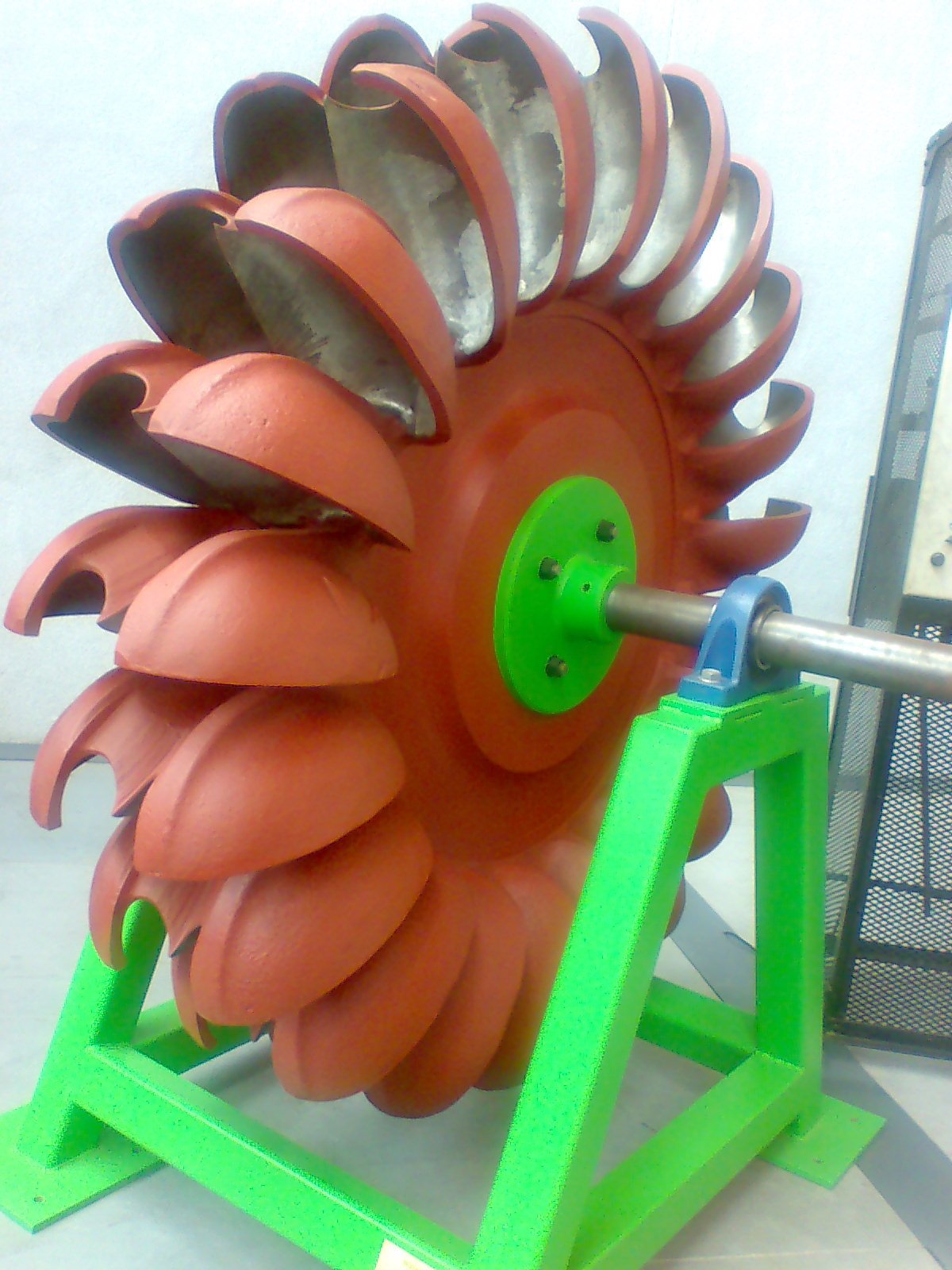 Turbina hidraúlica. Museo de la Técnica de Terrassa